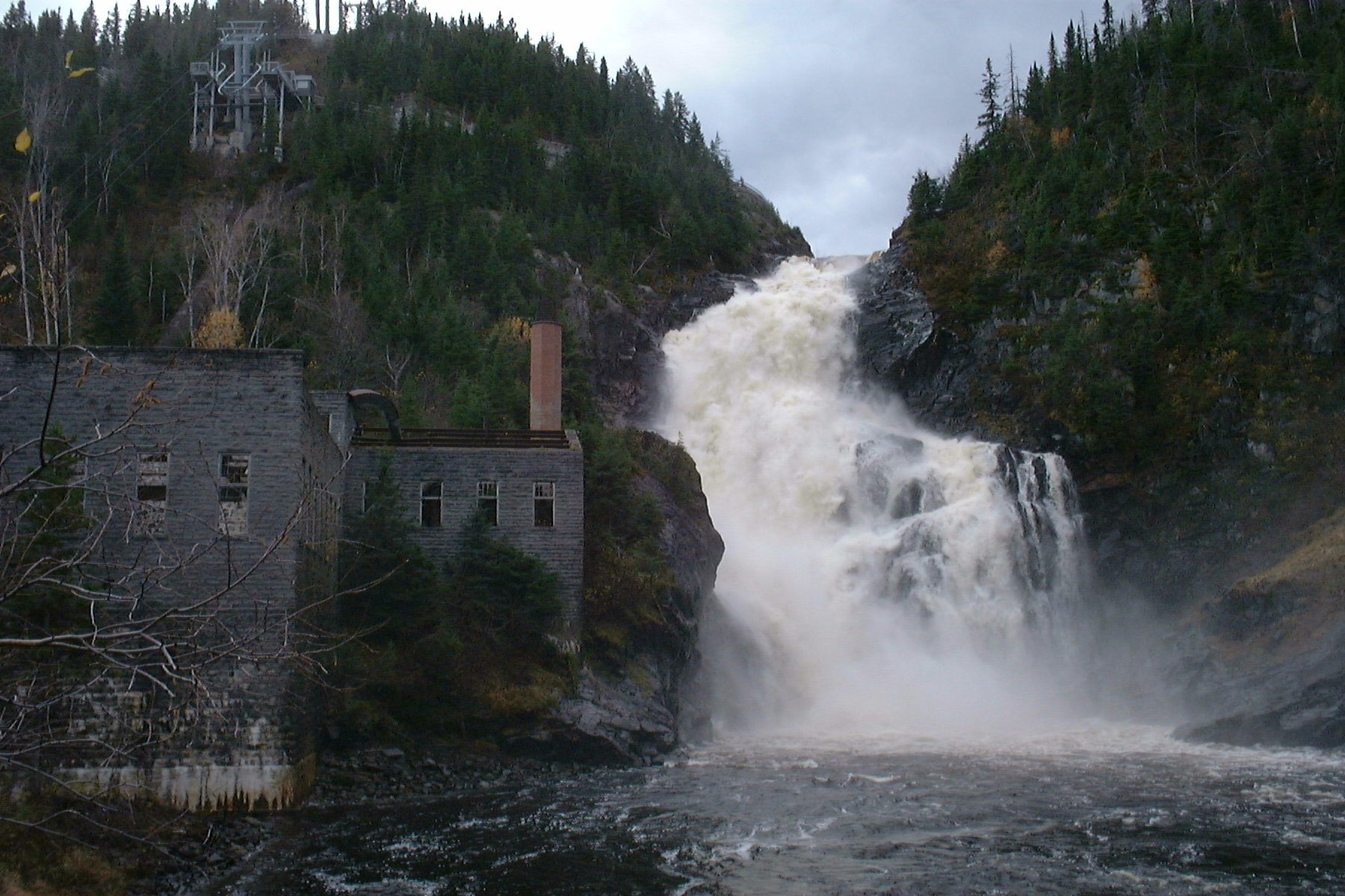 Chute de Val-Jalbert, Rivière Ouiatchouane